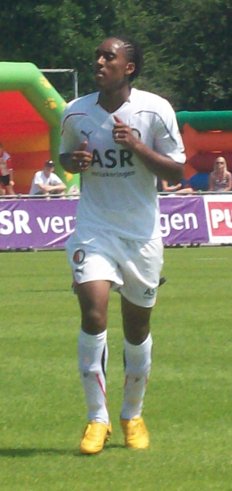 Leroy Fer tijdens de eerste training van Feyenoord